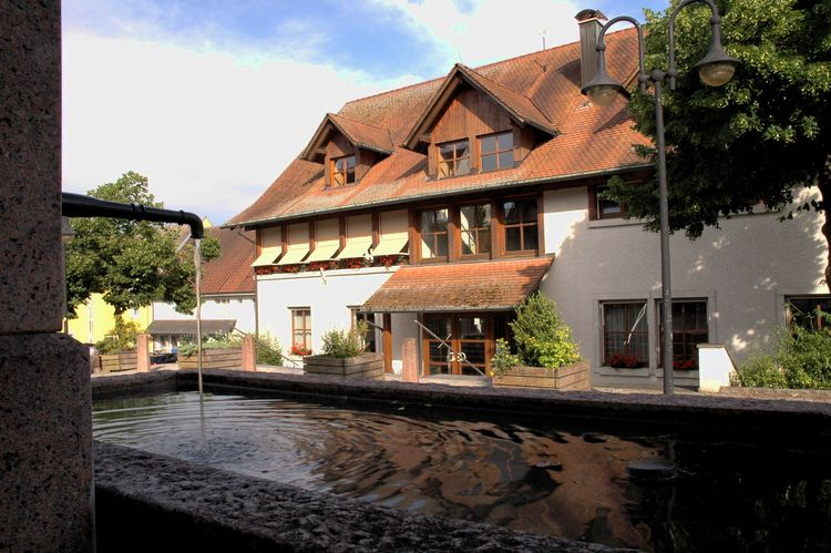 Das Rathaus von Lottstetten